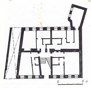 Мінск. Рэвалюцыйная. План 1-га паверха дома № 26